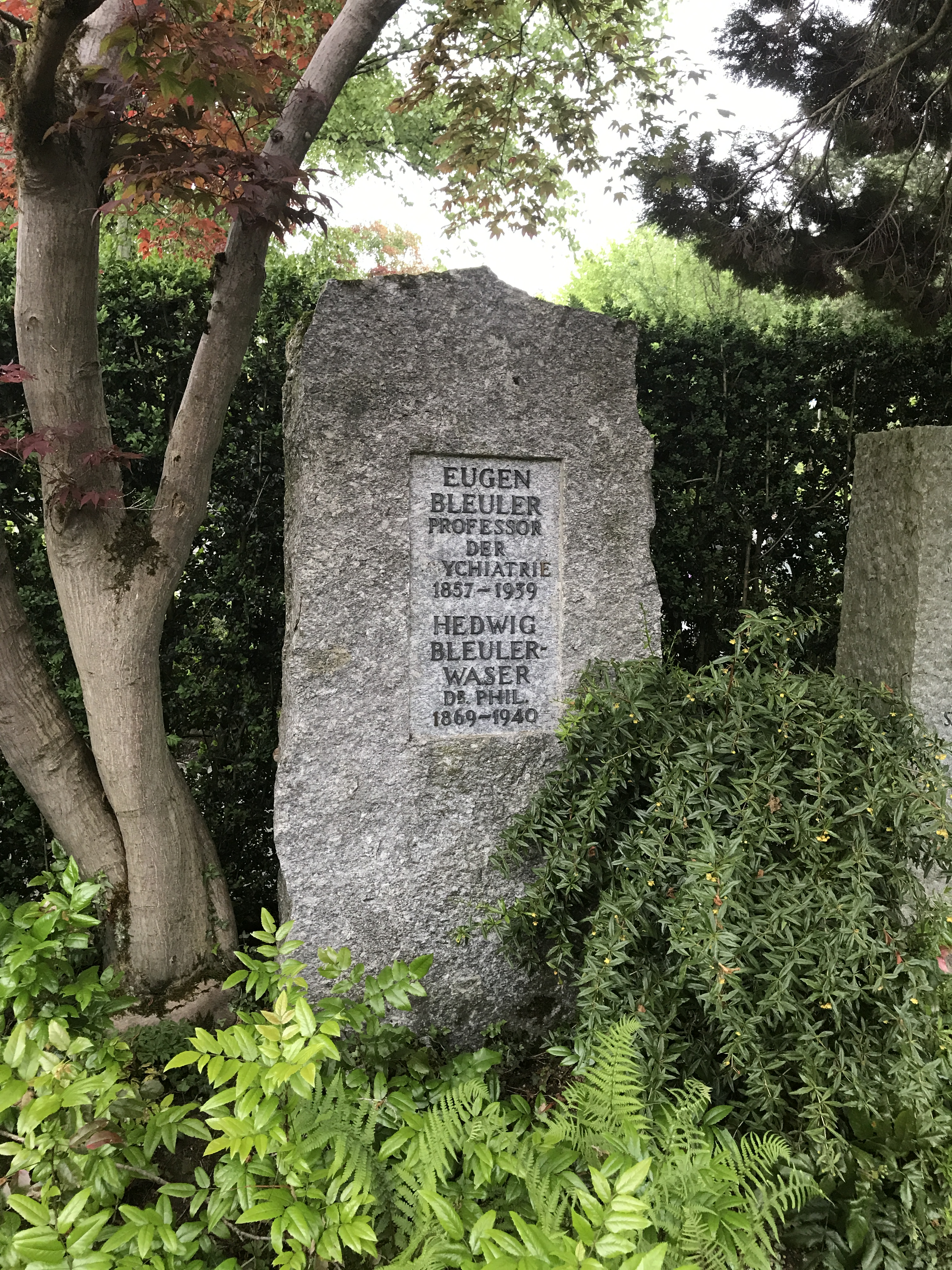 Grabstein von Eugen Bleuler auf dem Zolliker Friedhof